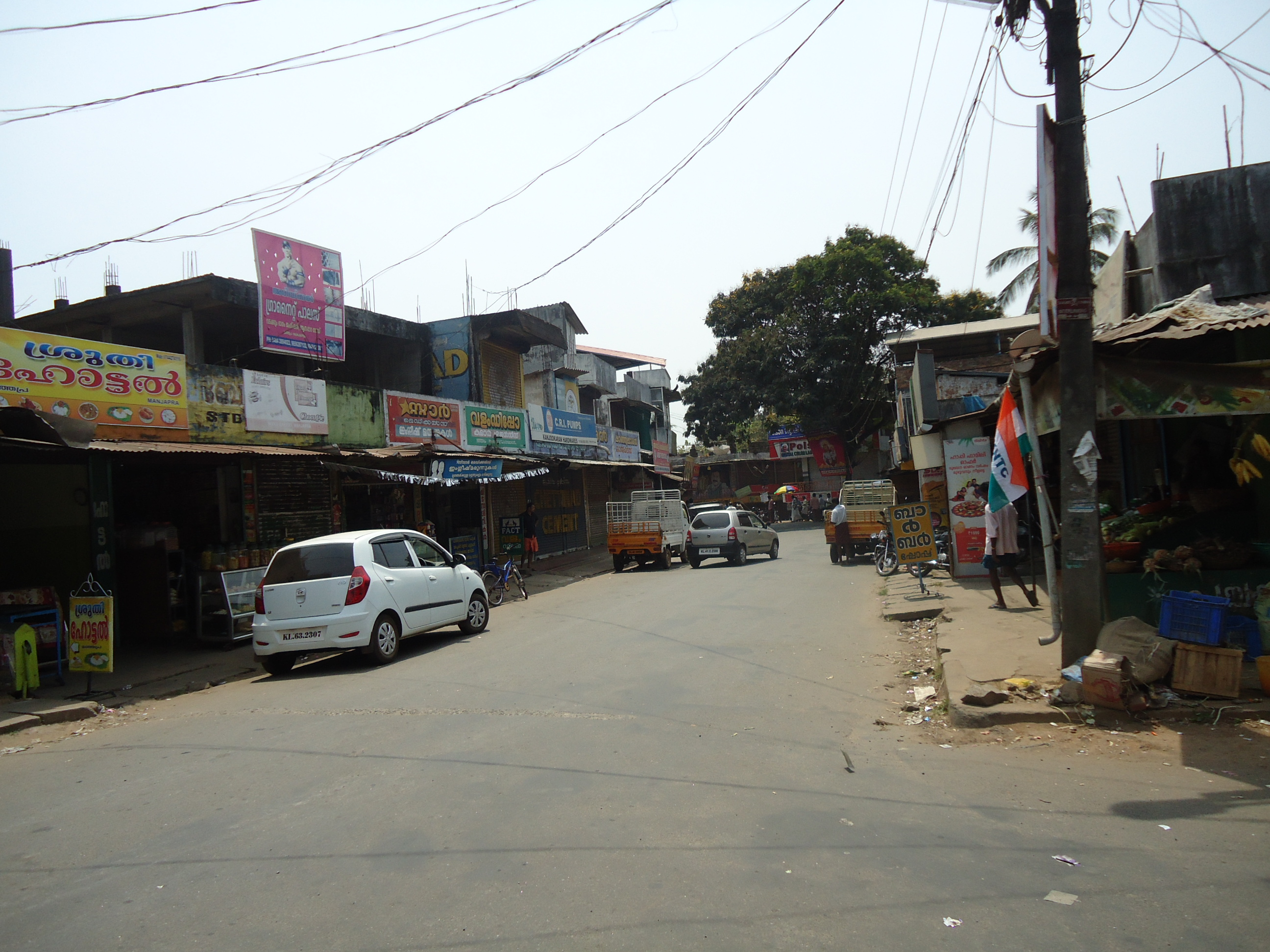 Manjapra Junction